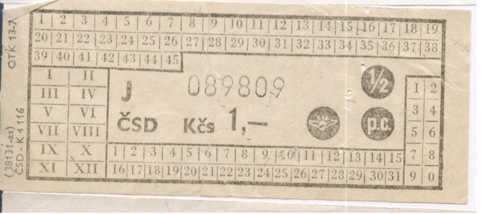 Starý typ útržkové jízdenky s předtištěnou cenou, využívaný cca do poloviny 80. let průvodčími při odbavování cestujících na krátkou vzdálenost bez přestupu.